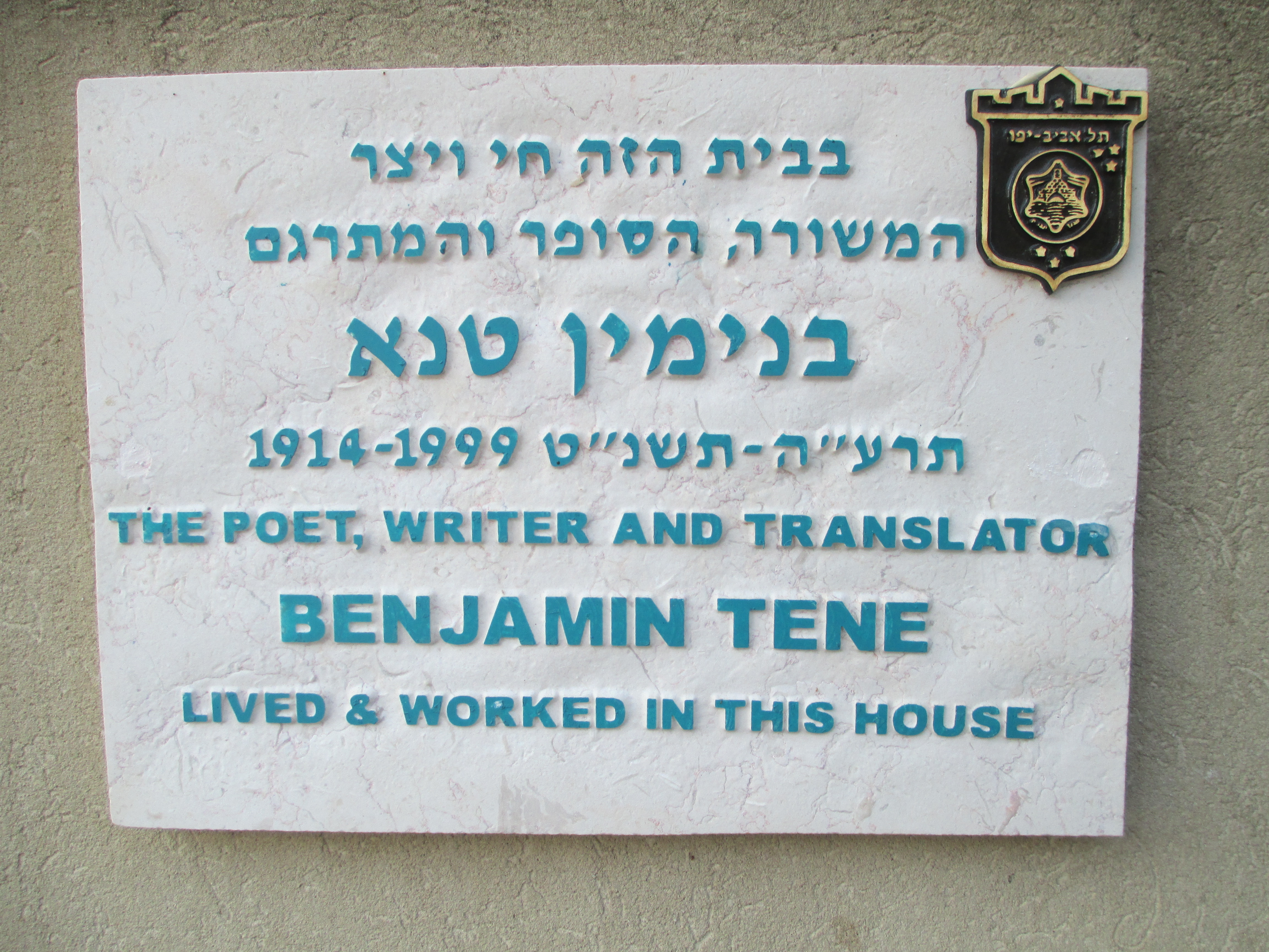 לוחית זיכרון על ביתו של בנימין טנא ברחוב קרני 8 בתל אביב